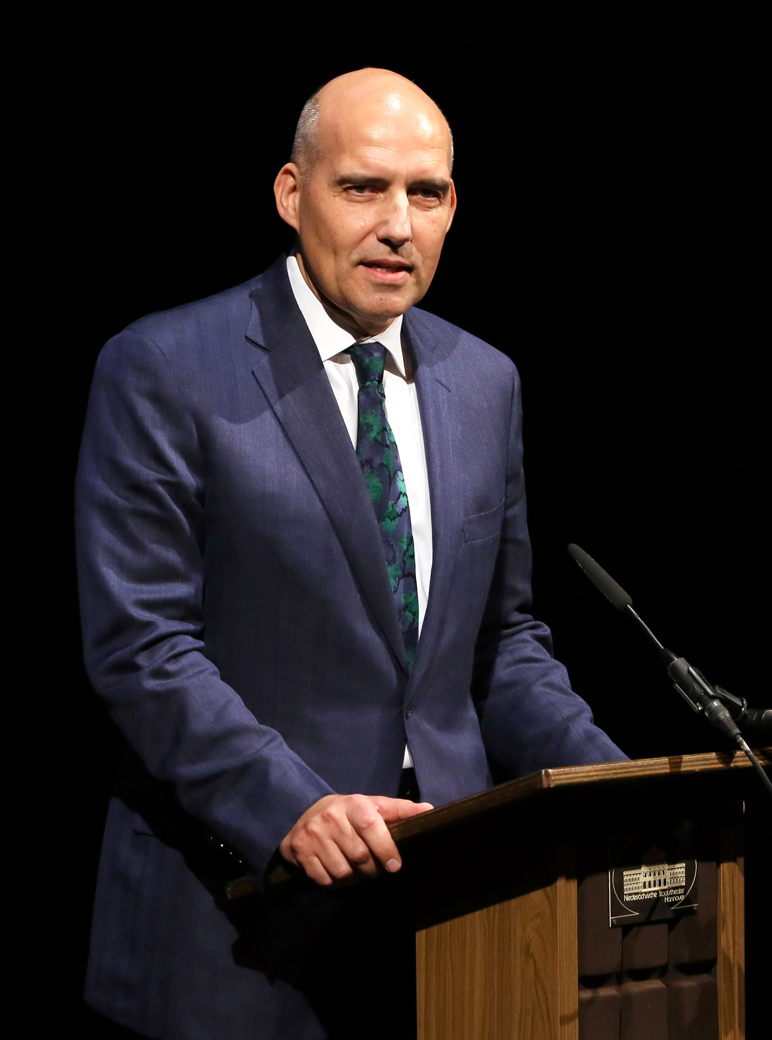 Eckhard Nagel 2018